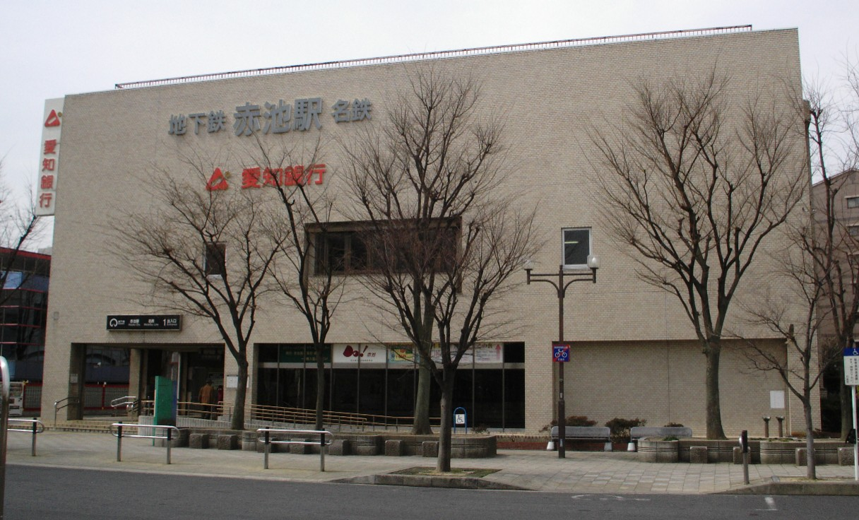 赤池駅